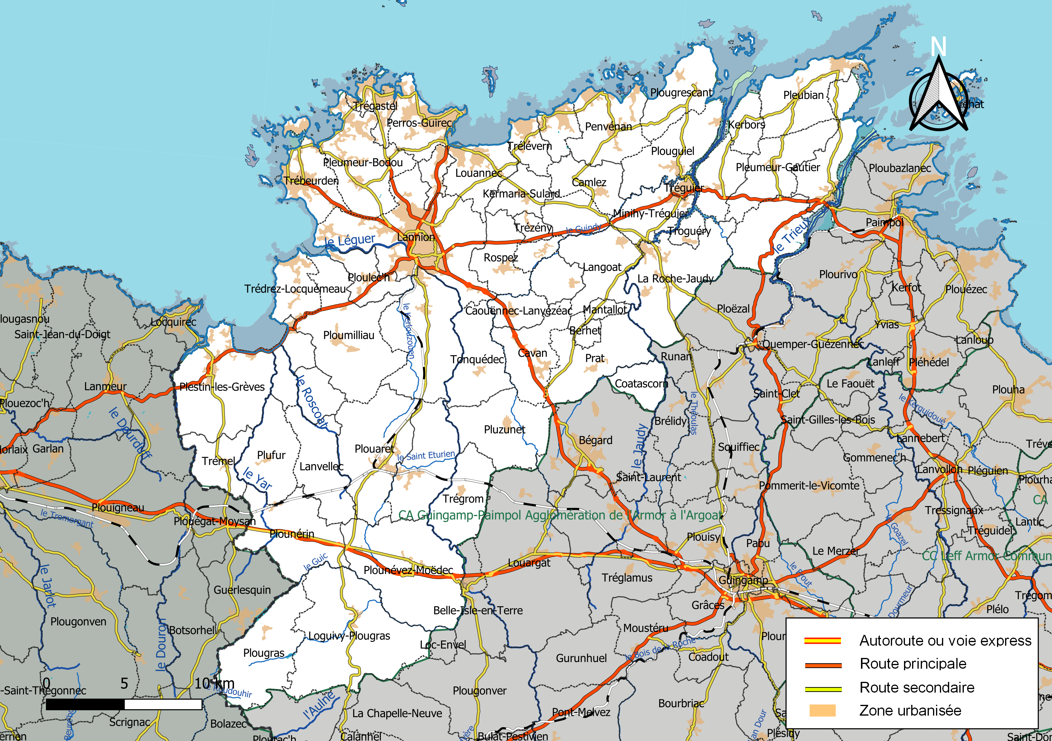 Carte géographique de la Communauté d'agglomération Lannion-Trégor Communauté, département des Côtes-d'Armor, France. Composition au 1er janvier 2019.